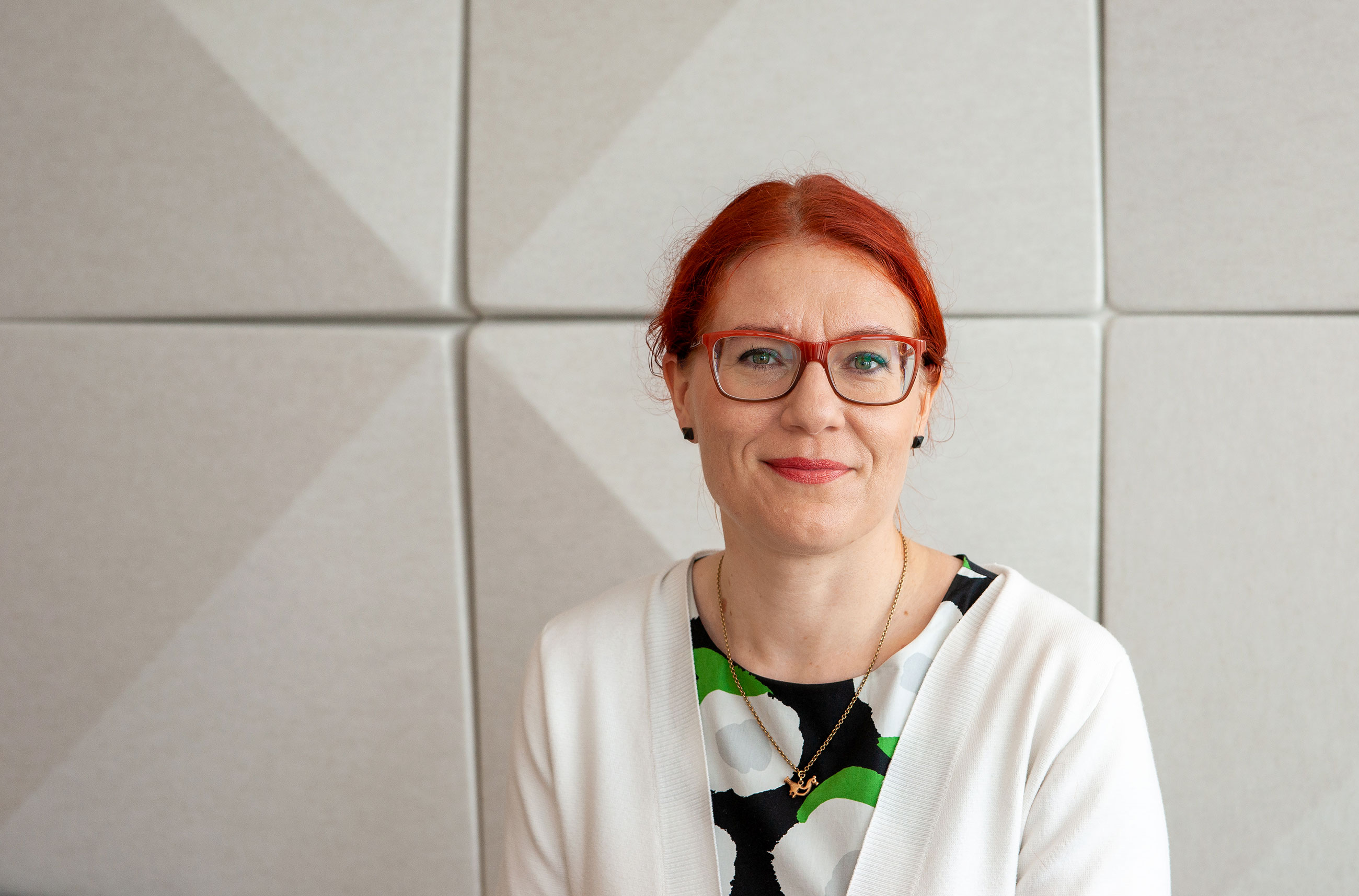 Annika Rönni-Sällinen, Palvelualojen ammattiliiton puheenjohtaja